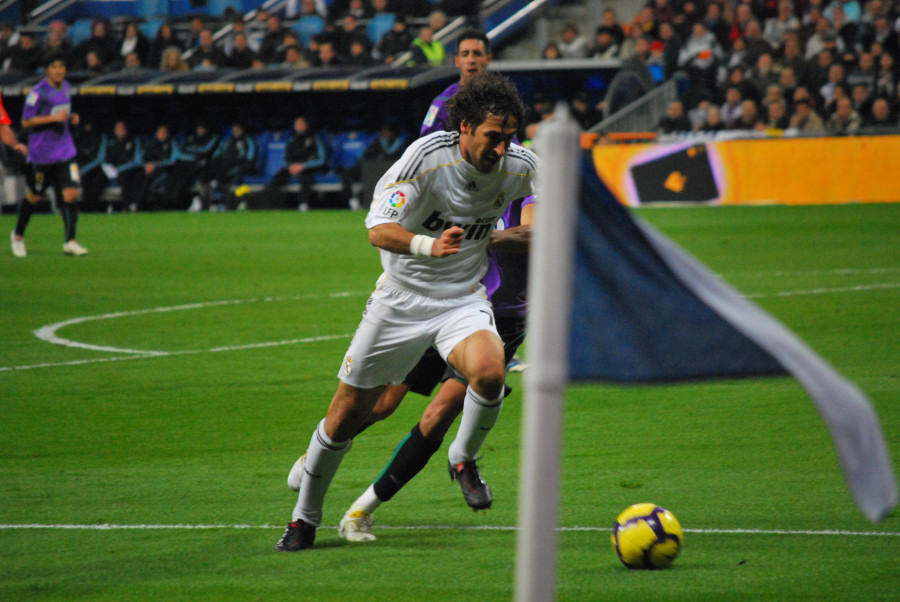 Real Madrid 2 - Malaga 0 24 enero 2010